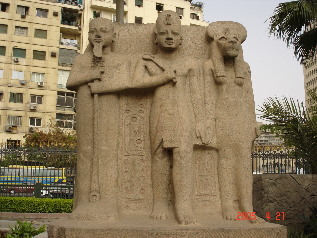 II. Ramszesz Ptah és Szahmet istenek között (Egyiptom, Kairó, Tahrír tér, Múzeum kert)